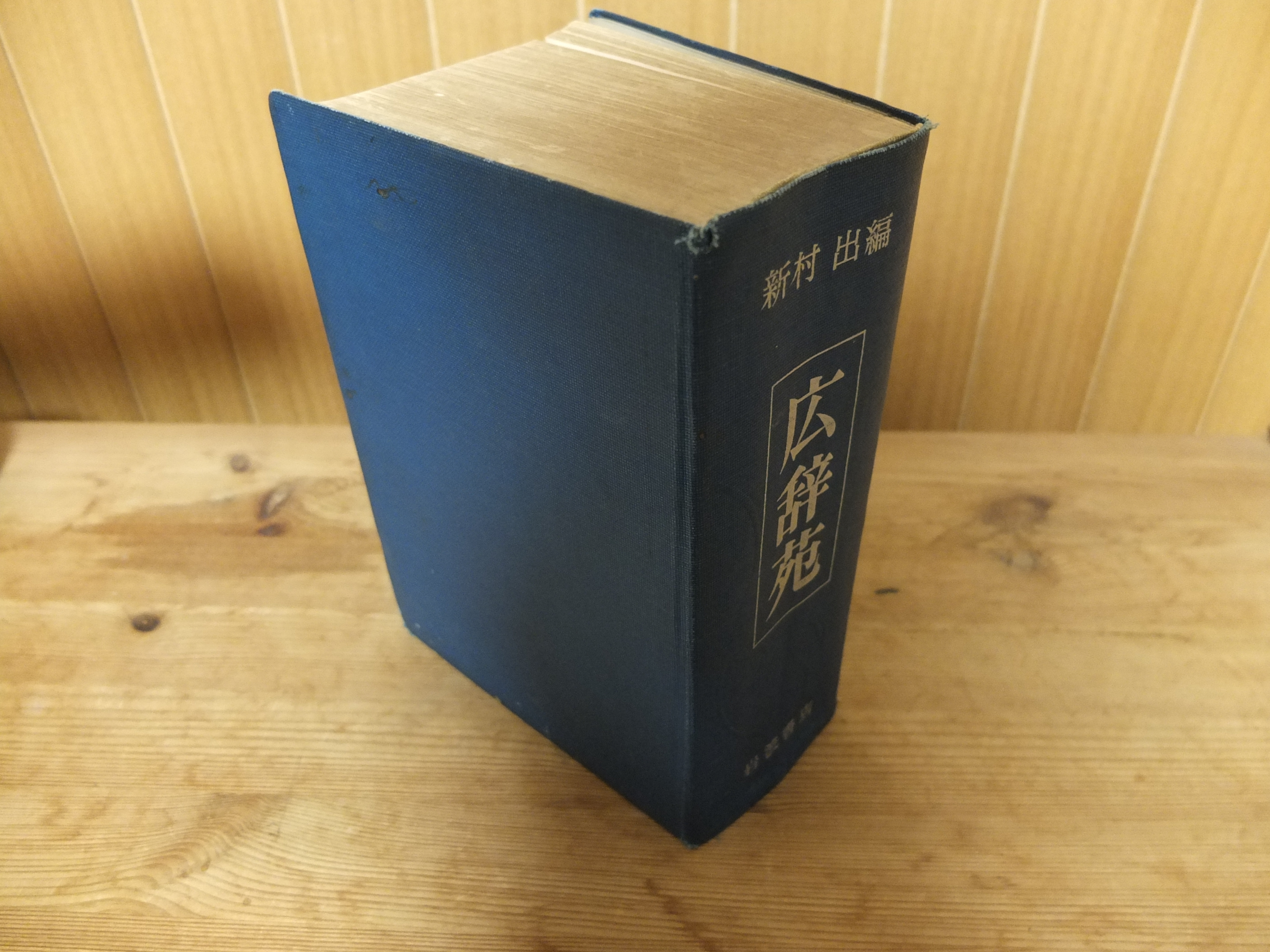 岩波書店『広辞苑』第二版